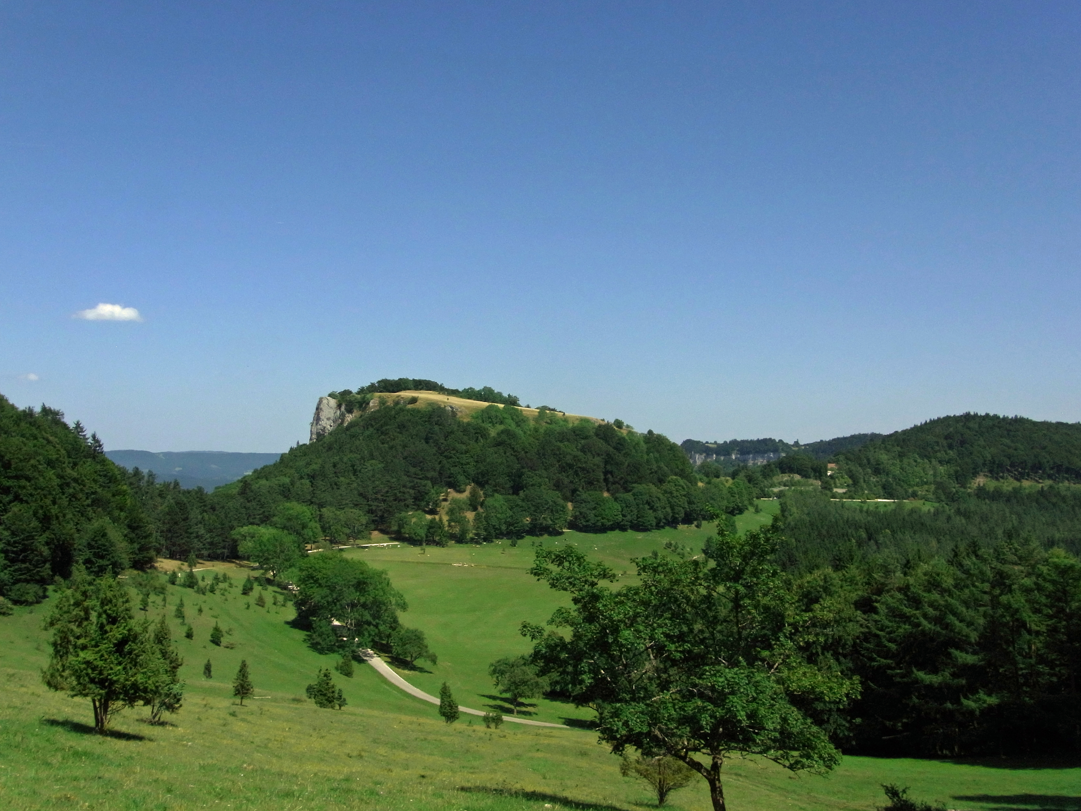 Die Lochen: Blick zum Lochenstein